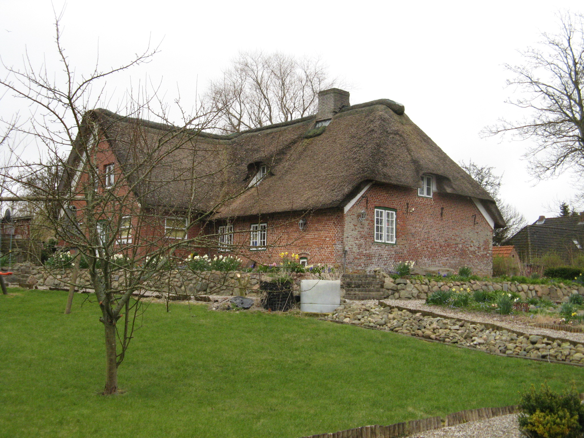 "Haus Hase" in Fahretoft. Author: Dirk Ingo Franke